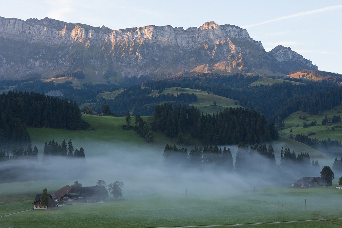 Schangnau im Morgennebel mit Blick auf den Hohgant